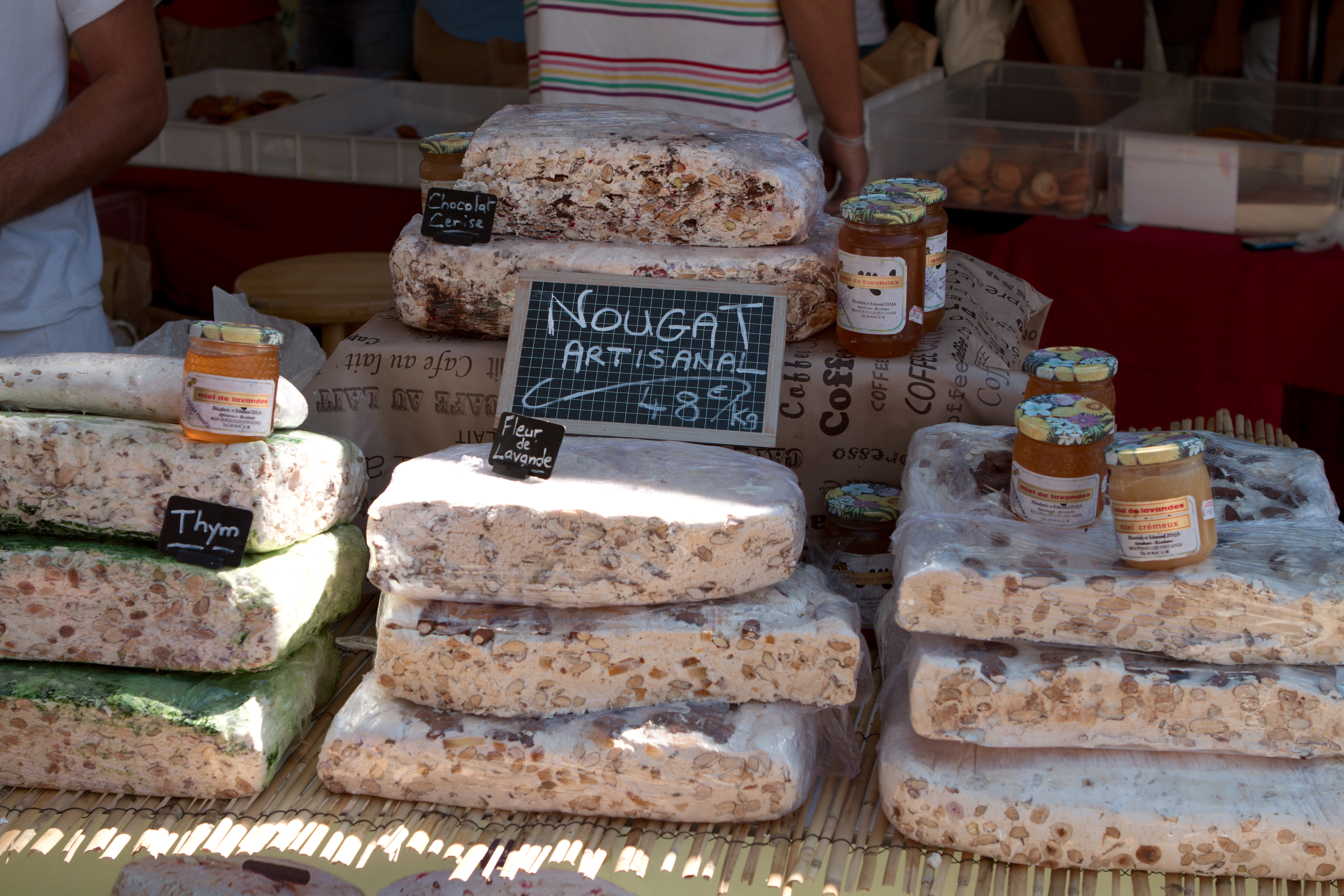 Nougat artisanal au thym et à la fleur de lavande sur le marché d'Aix-en-Provence (Bouches-du-Rhône, France)